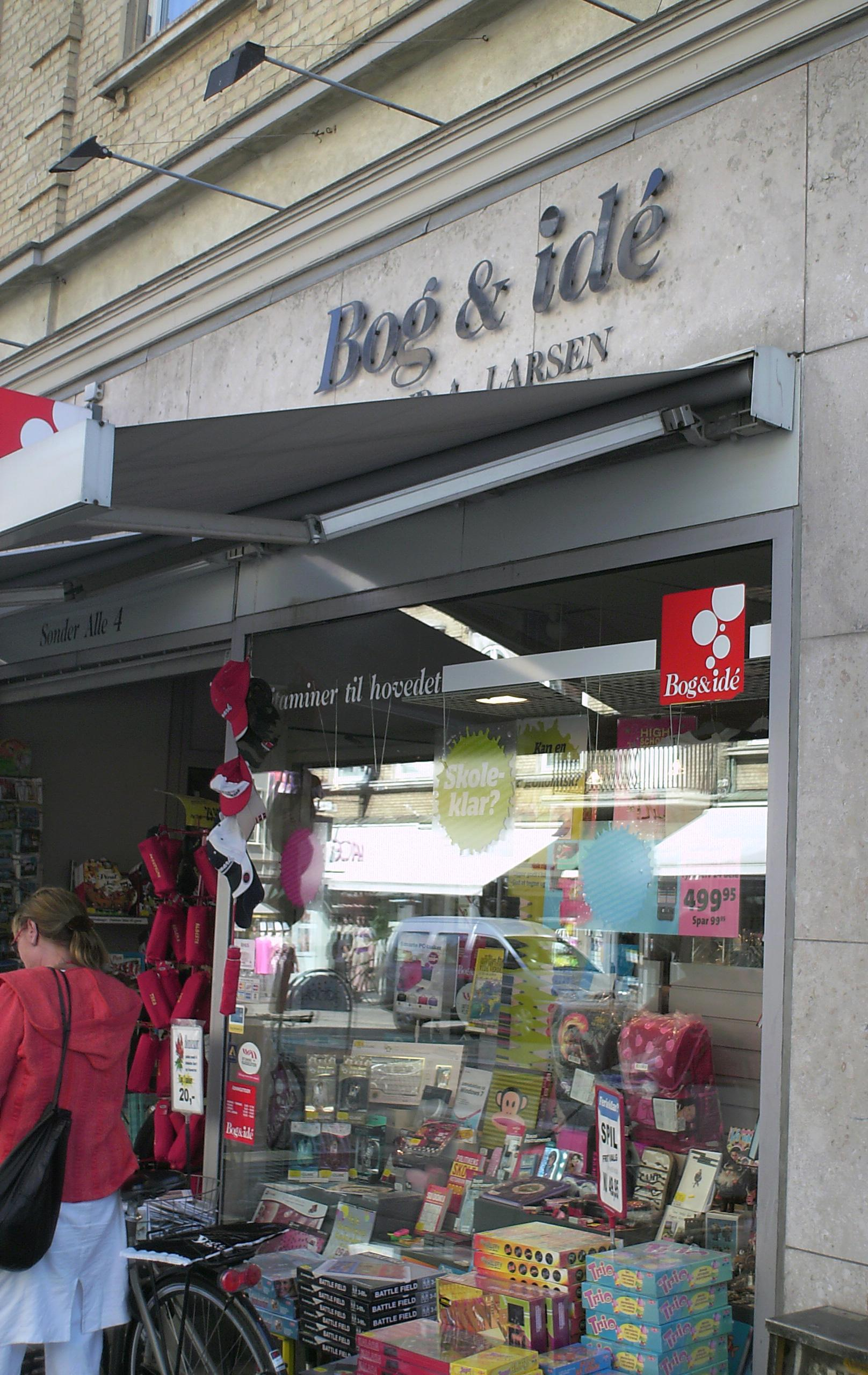 Bog & Idé-butik i Århus, Danmark.